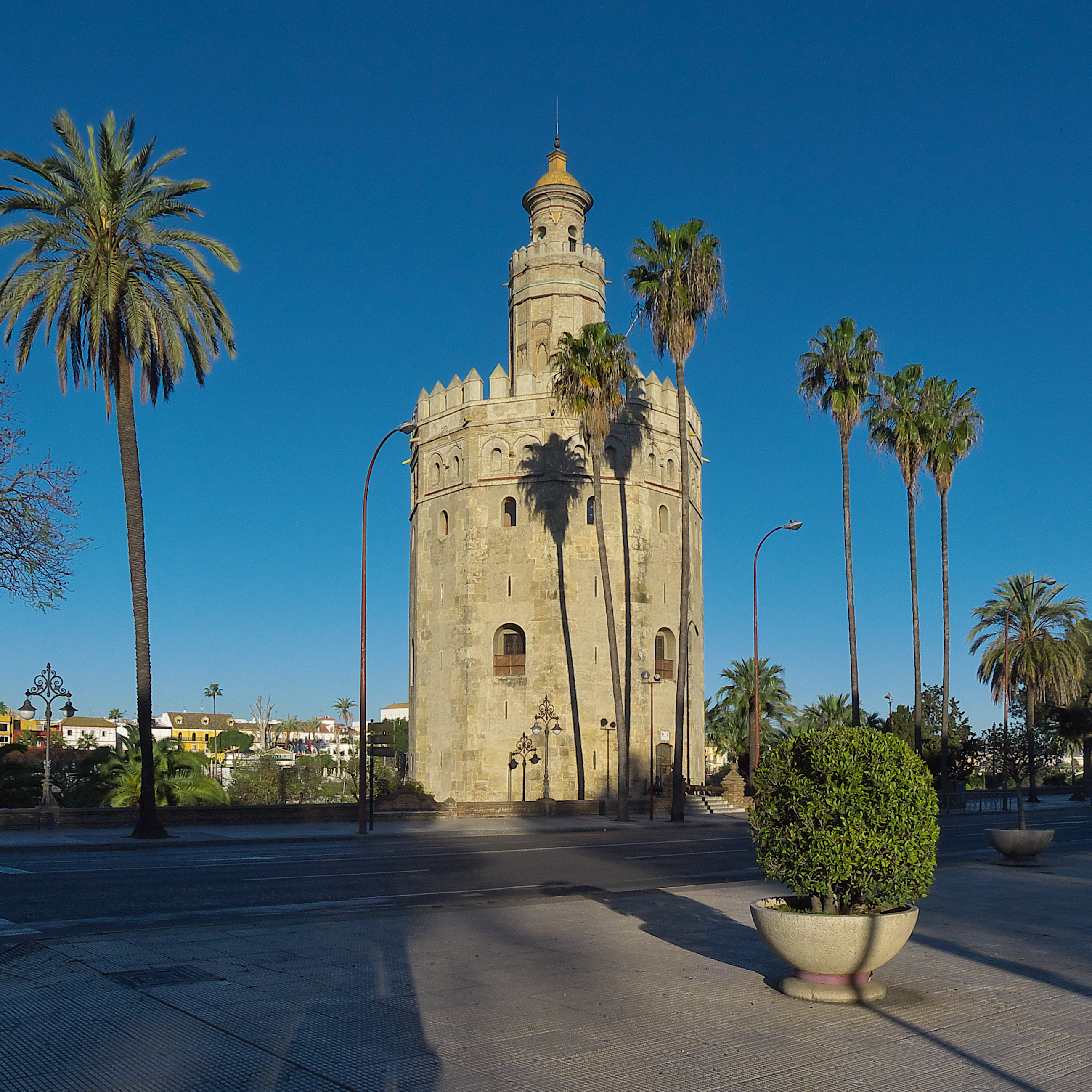 El gobernador almohade Abul-Ula Idris levanta la torre junto al al-wadi al-Kabir (ca. 1221)